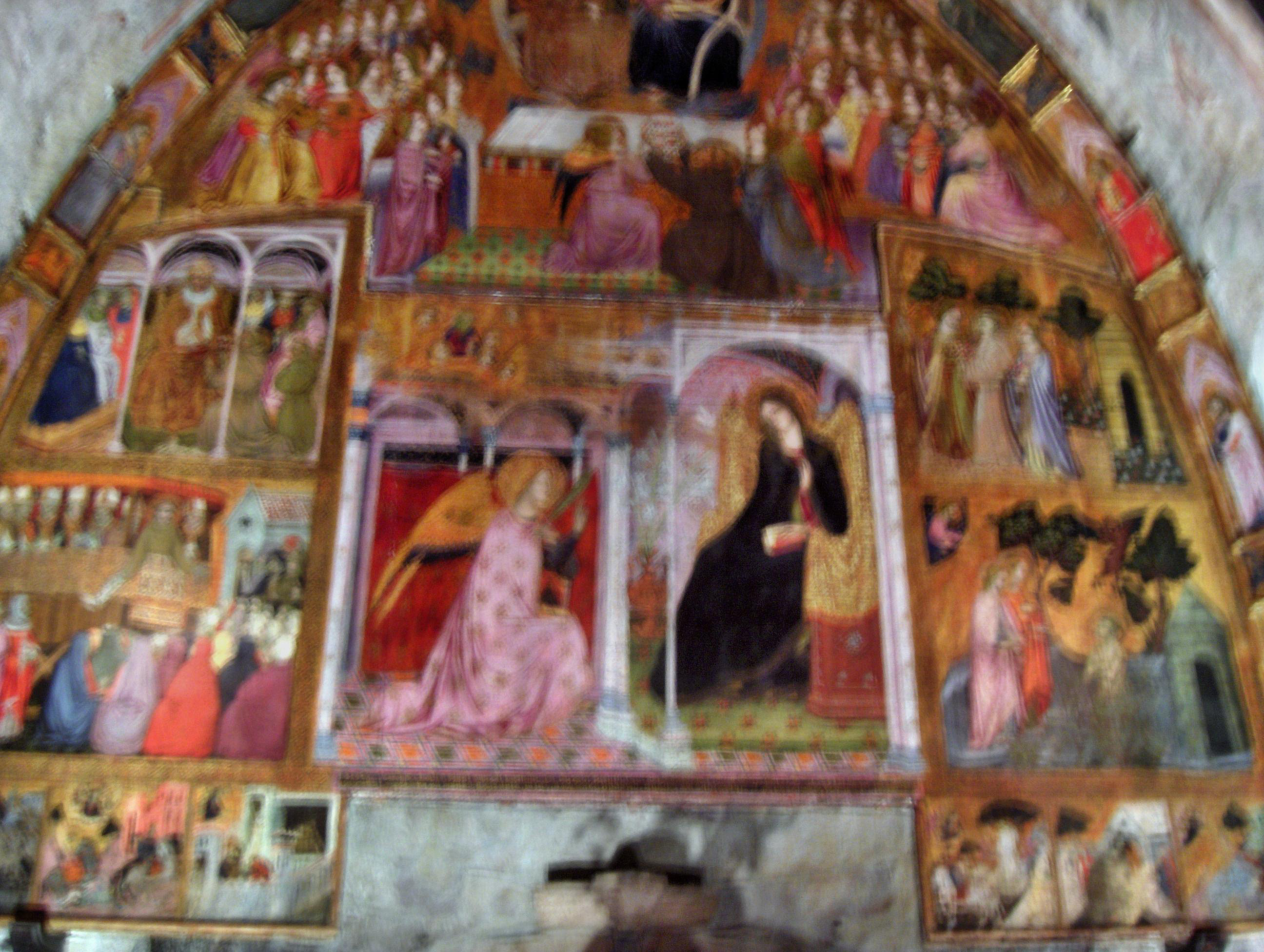 Six-part fresco